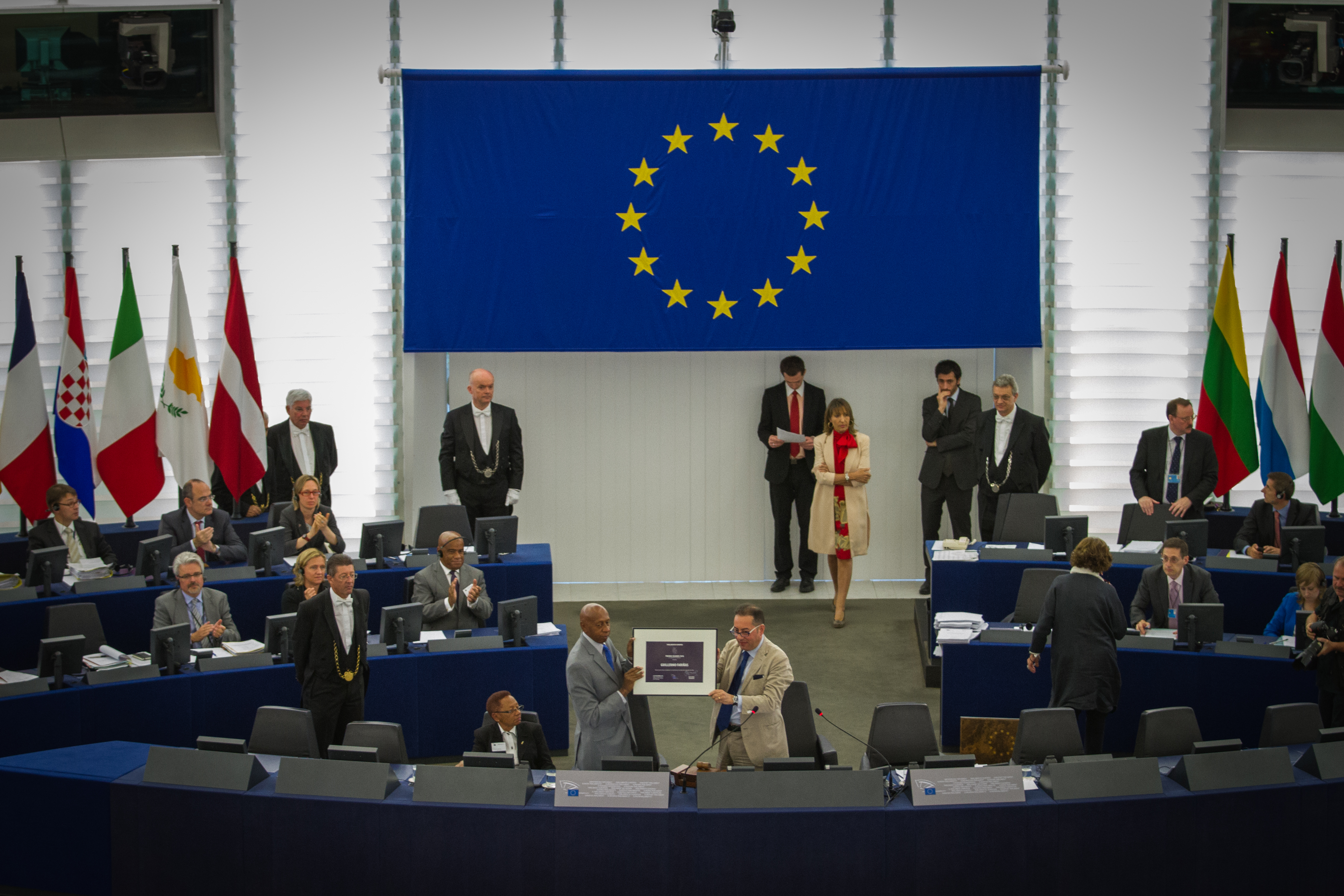 Remise du prix Sakharov 2010 à Guillermo Fariñas Strasbourg Parlement européen le 3 juillet 2013